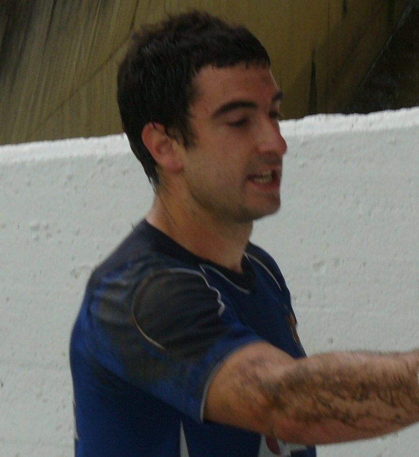 Eñaut Zubikarai en Zubieta